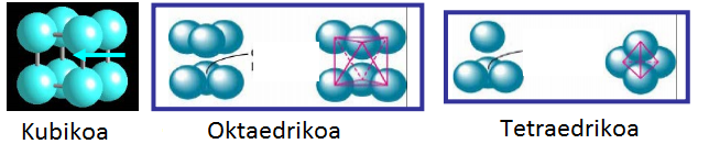 Hutsune kubiko, oktaedriko eta tetraedrikoa